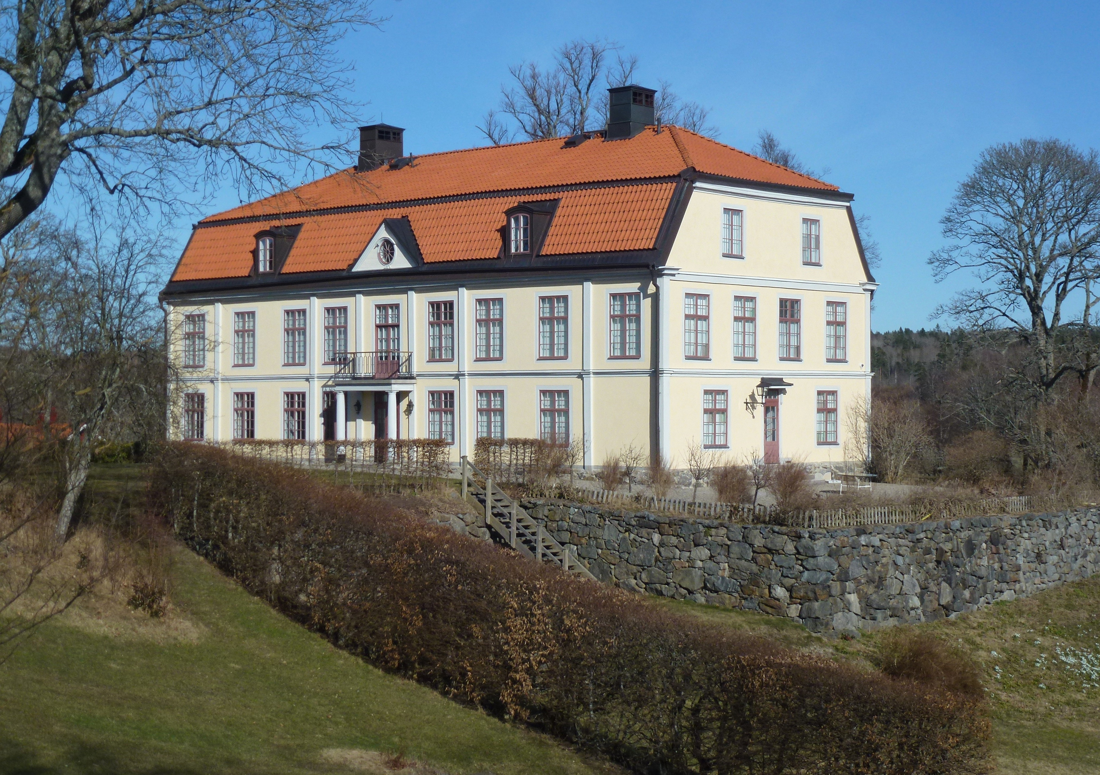 Djursnäs gård, huvudbyggnad